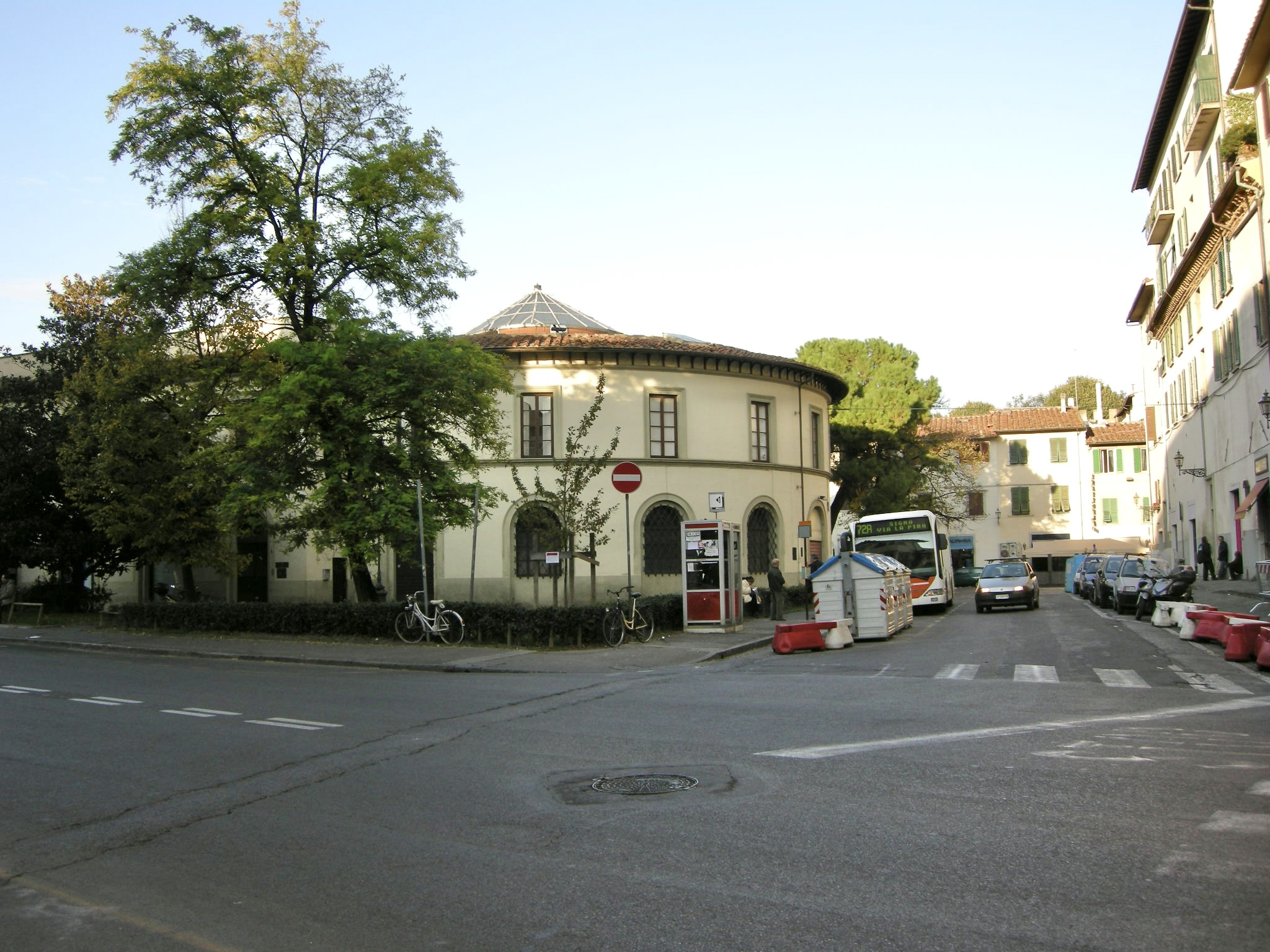 Piazza dei porta al prato